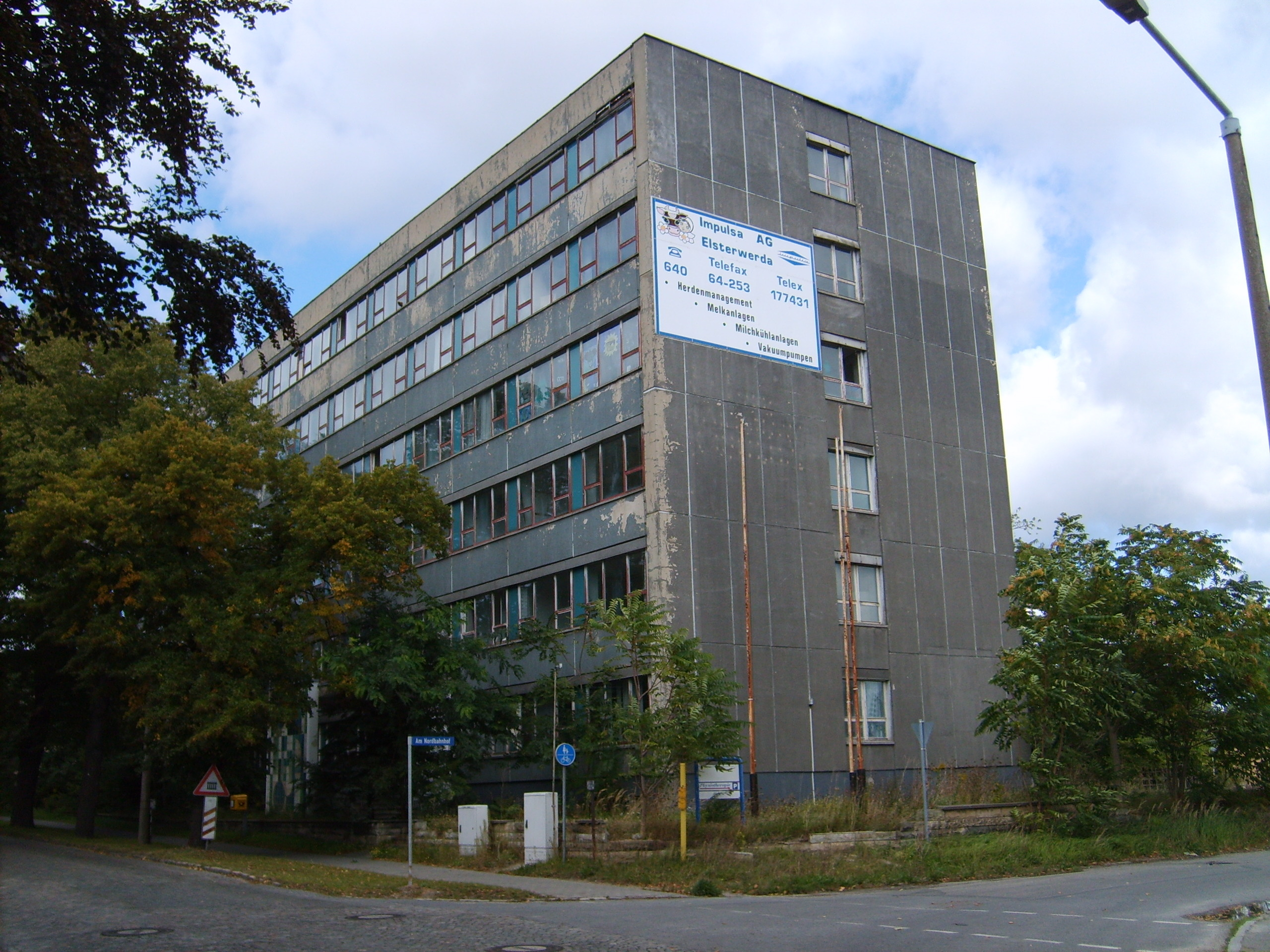 Das Elfa-Hochhaus in Biehla